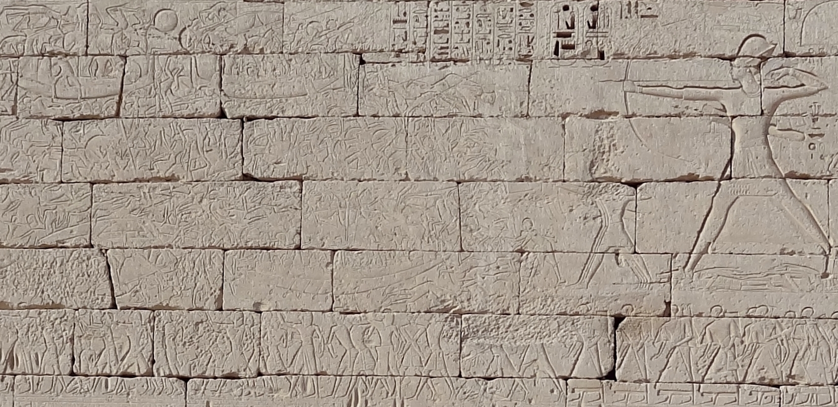 Der Kampf gegen die Seevölker an der Nordostwand des Totentempels Ramses’ III. in Medinet Habu, Ägypten